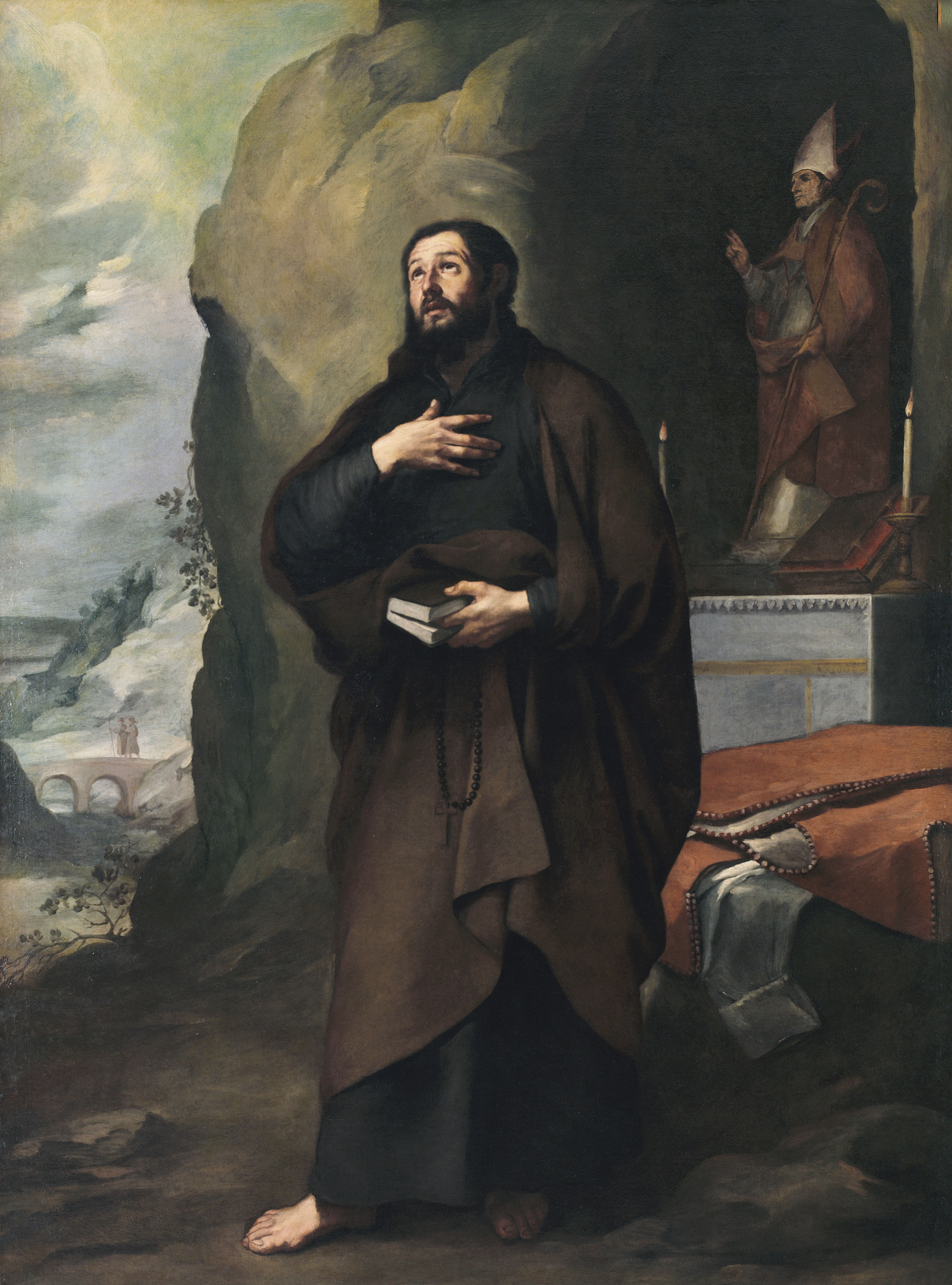 El lienzo representa al monje benedictino San Lesmes († 1097), de origen francés.